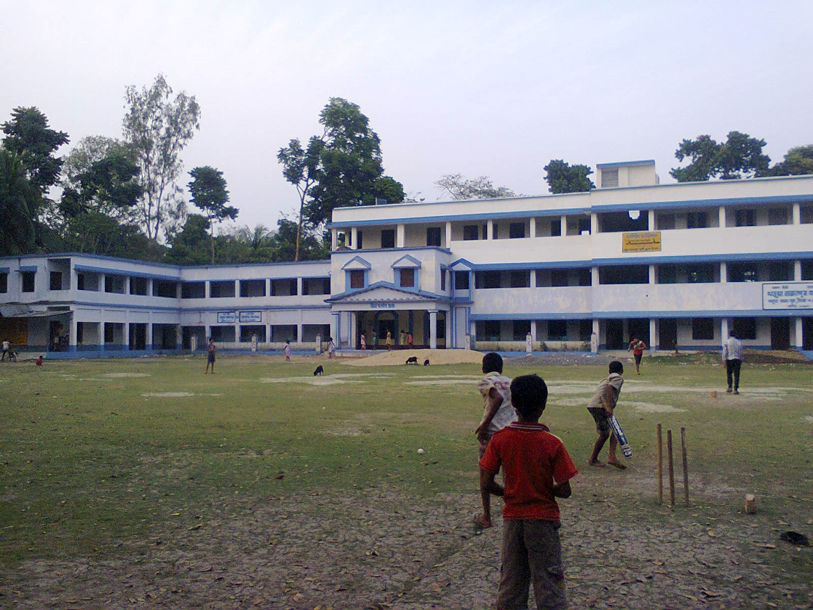 খড়ুয়া রাজাপুর উচ্চমাধ্যমিক বিদ্যালয়